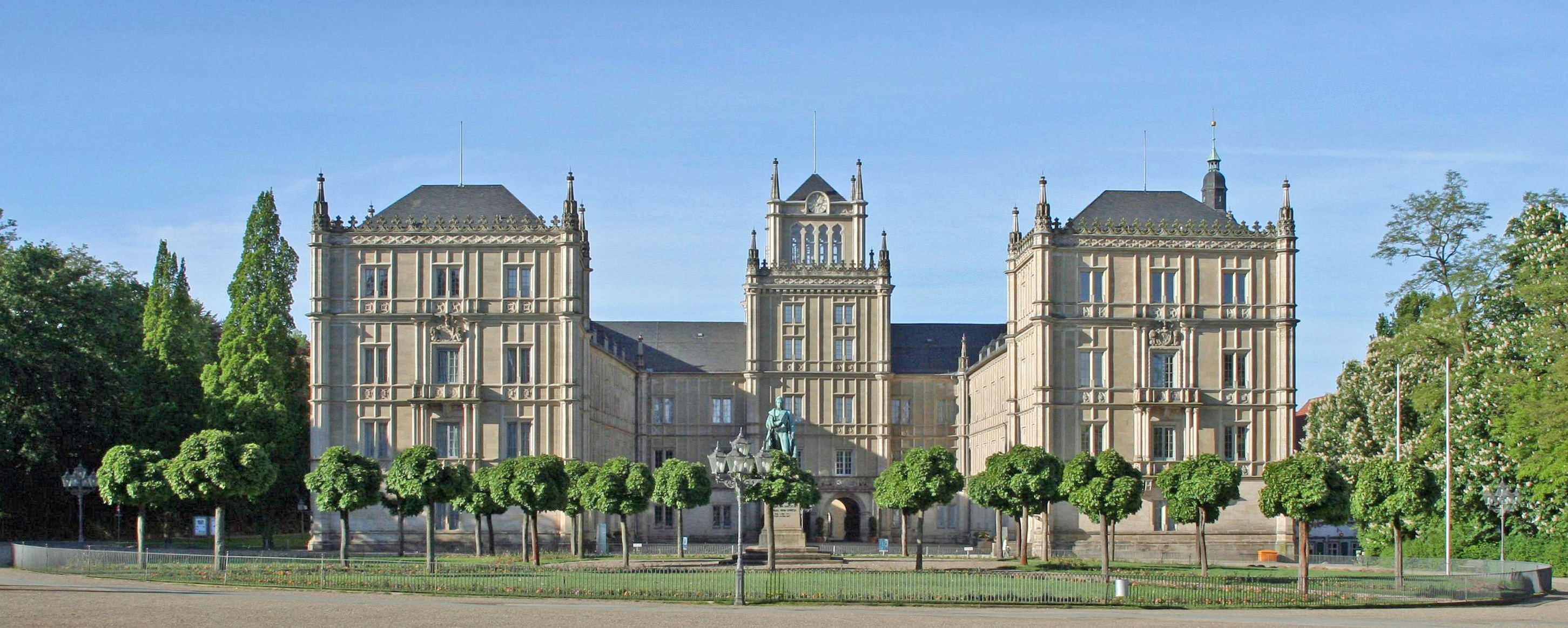 Schlossplatz mit Denkmal Herzog Ernst I. und Schloss Ehrenburg, Coburg (Germany)